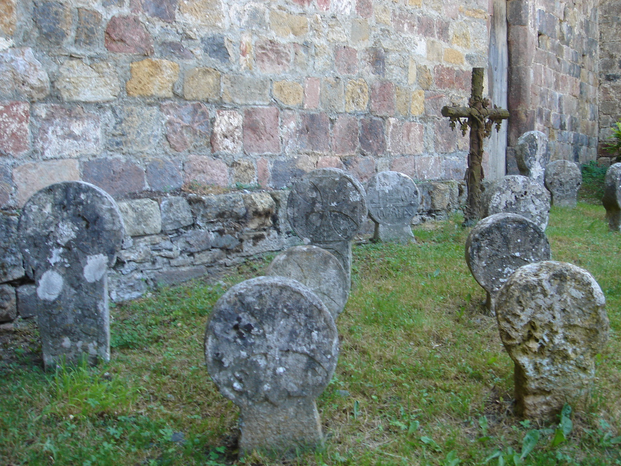 Estelas funerarias discoidales tipicamente vascas. Iglesia de Urdatx / Sainte-Engrâce, en la comarca de Sola (Pirineos Atlánticos, Francia).